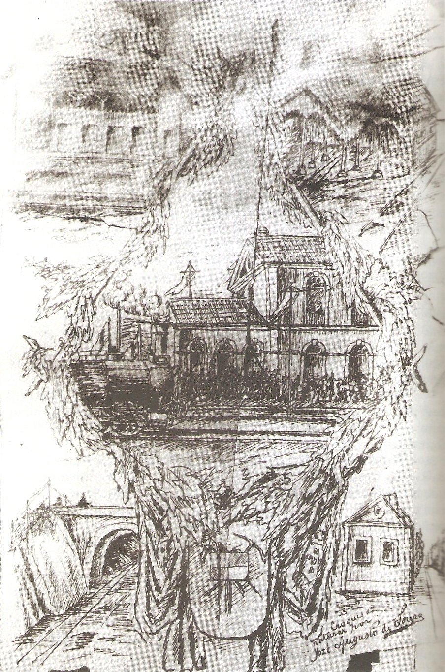 Gravura da cerimónia de inauguração da estação de Torres Vedras, na Linha do Oeste, em Portugal. Esta imagem foi originalmente publicada no jornal "O Progresso das Caldas" de 25 de Junho de 1887.